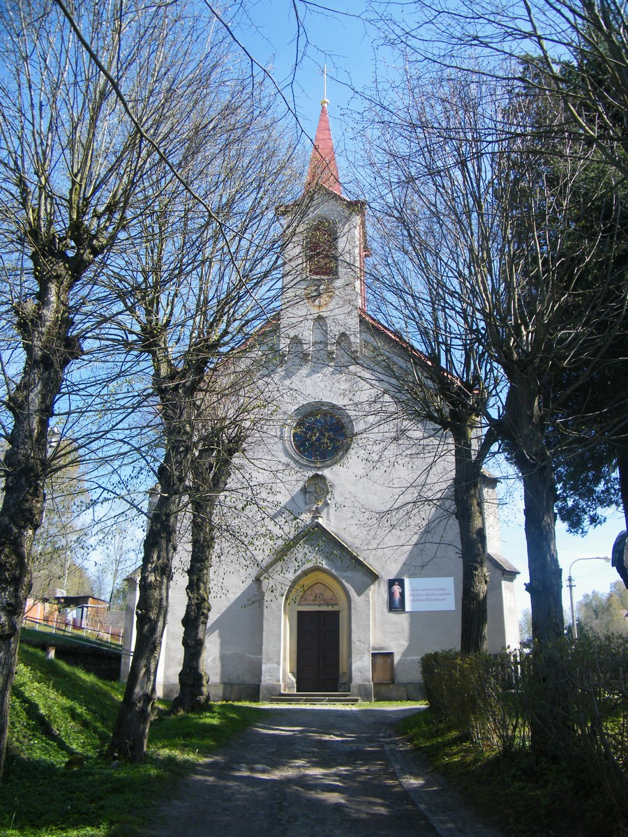 Kostel svatého Michaela archanděla v Dolní Poustevně